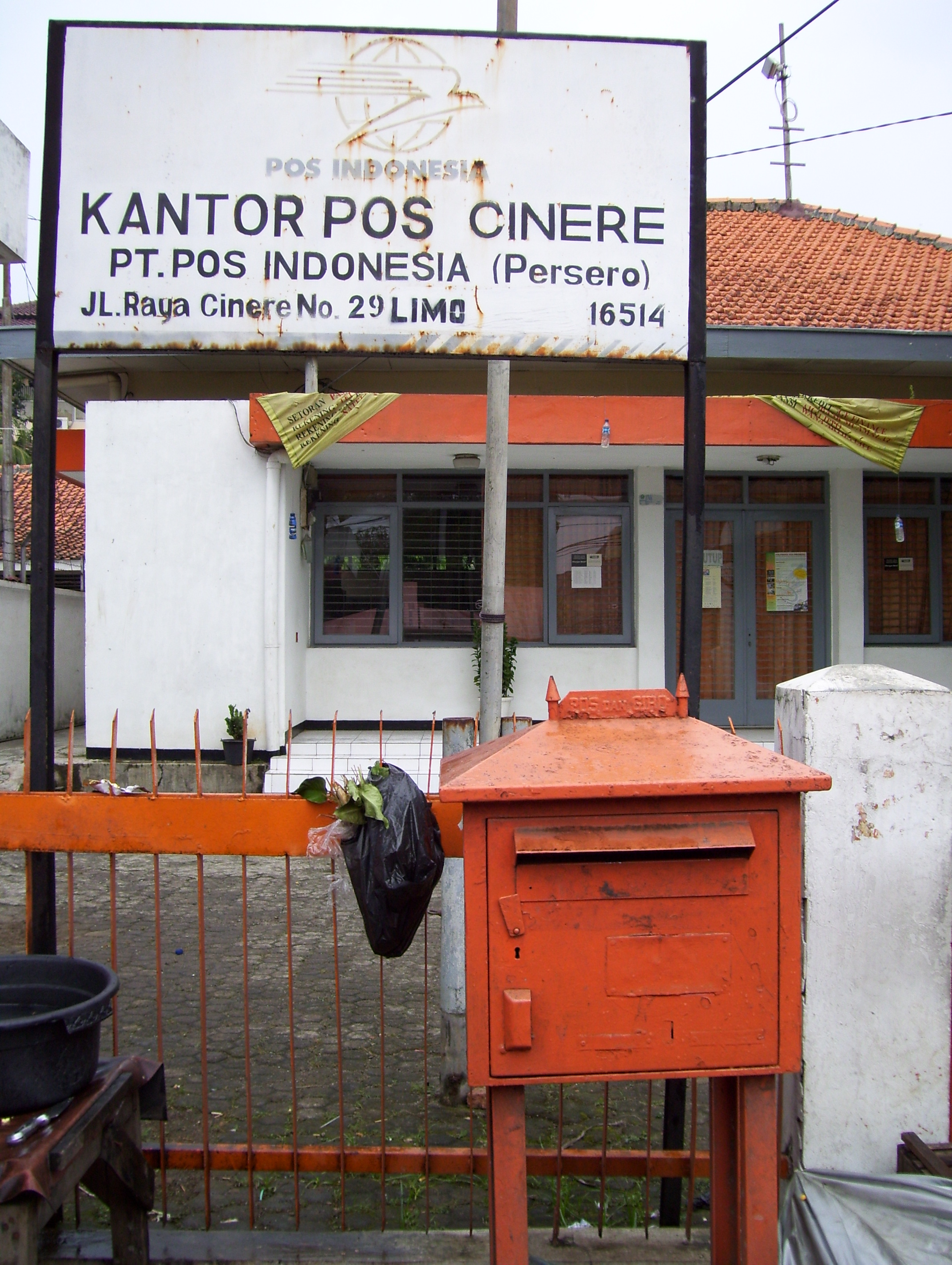 Bis surat di Indonesia